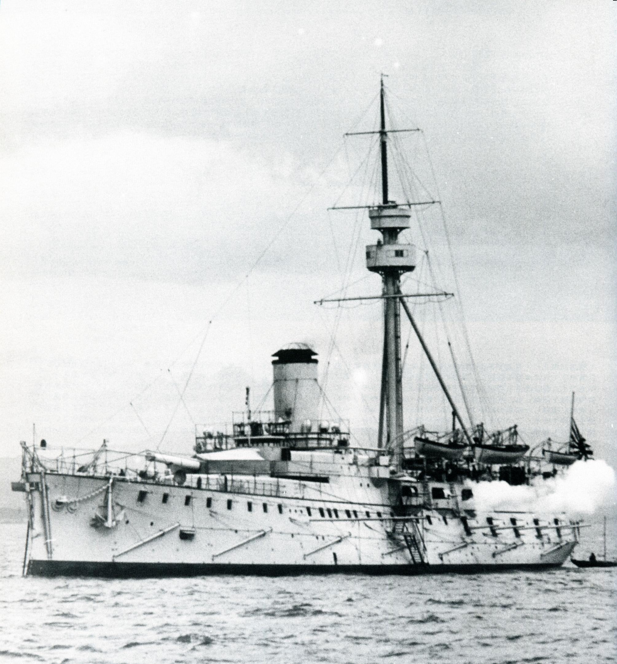 Japanese cruiser Itsukushima at Kobe, firing salute 1897